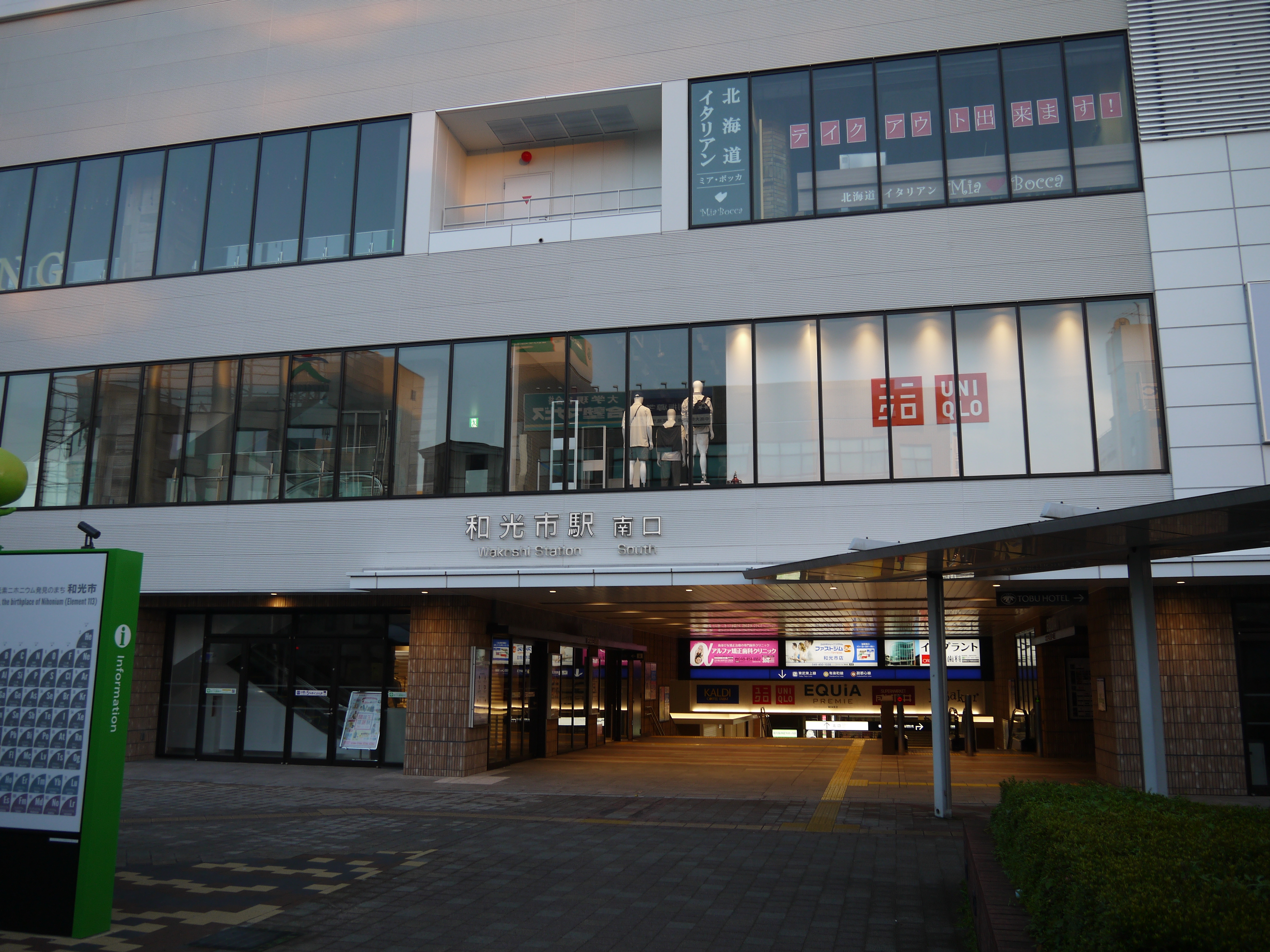 和光市駅南口 Panasonic Lumix DMC-GF3